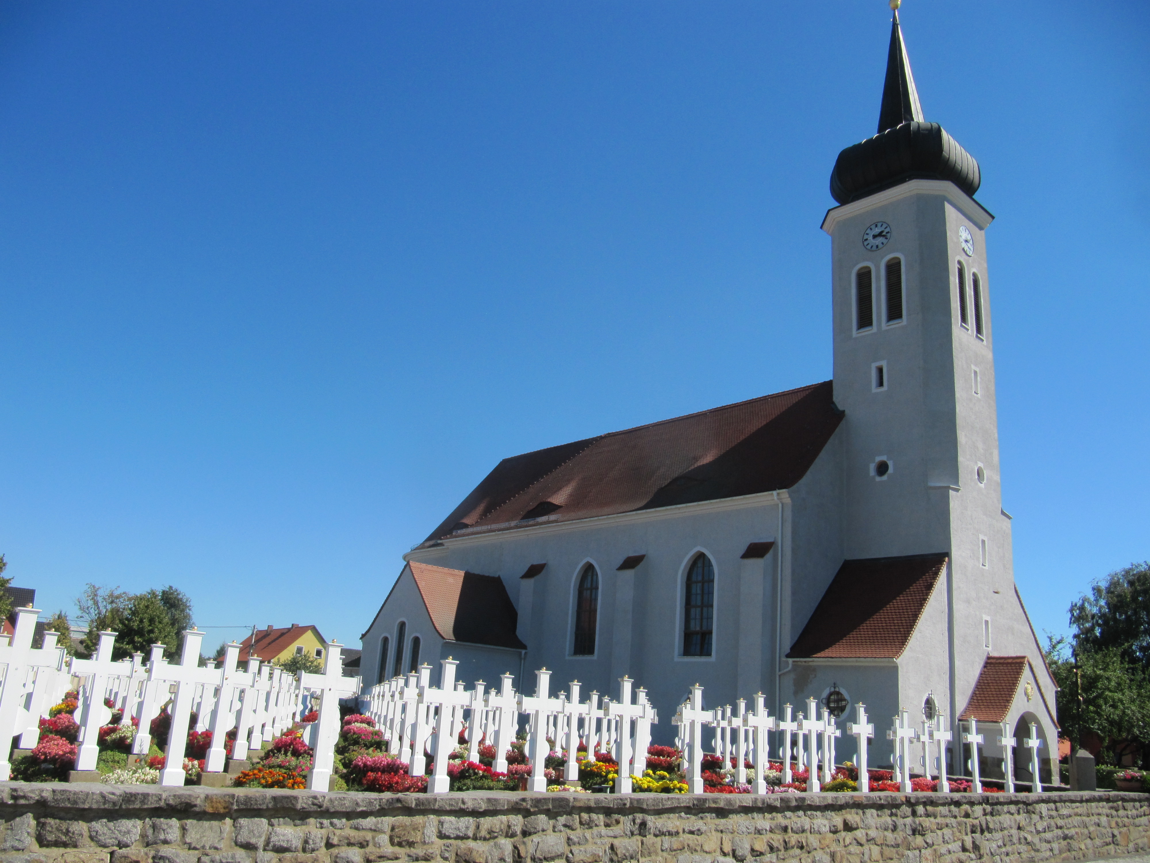 Церковь святой Екатерины в Ральбицах